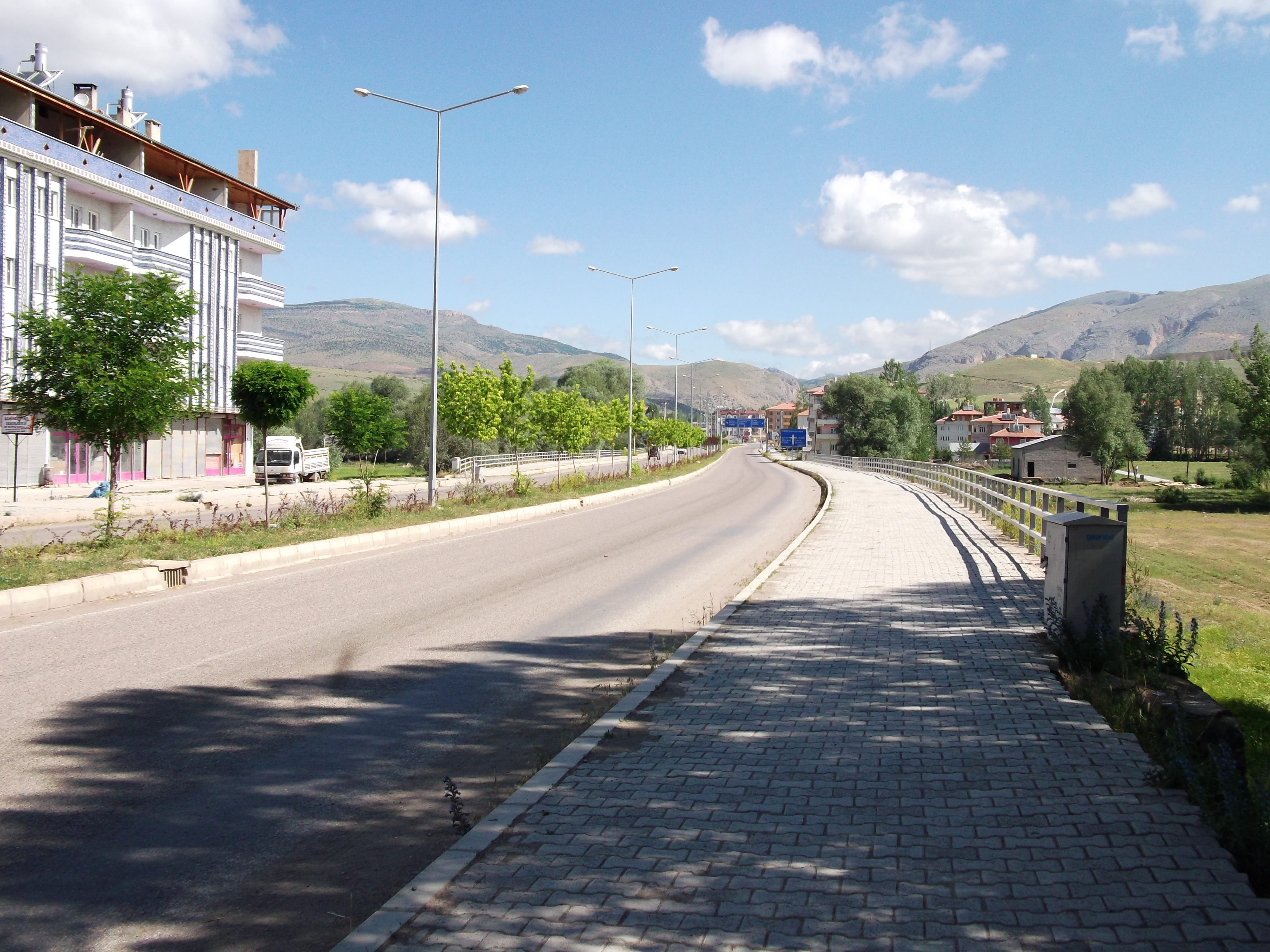 Gümüşhane Yolu...